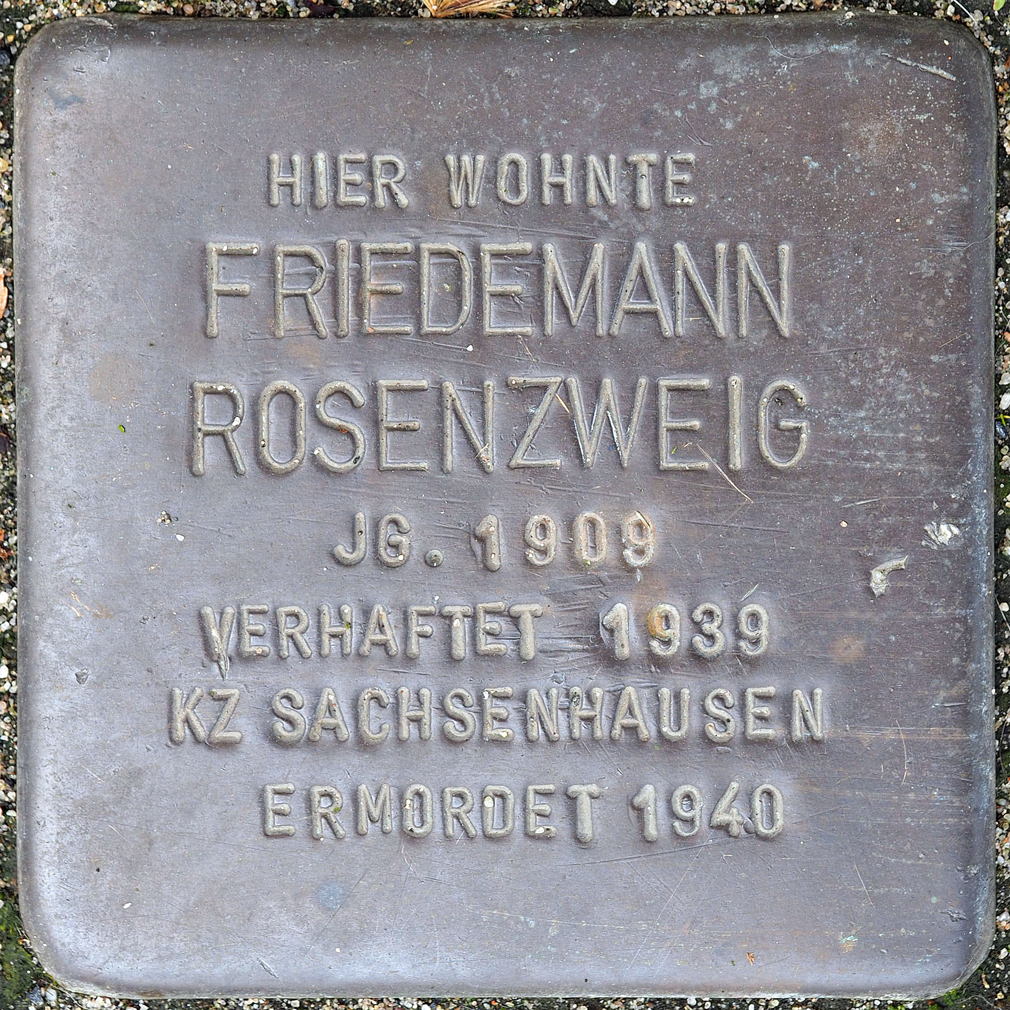 Stolpersteine MG: Rosenzweig, Friedemann